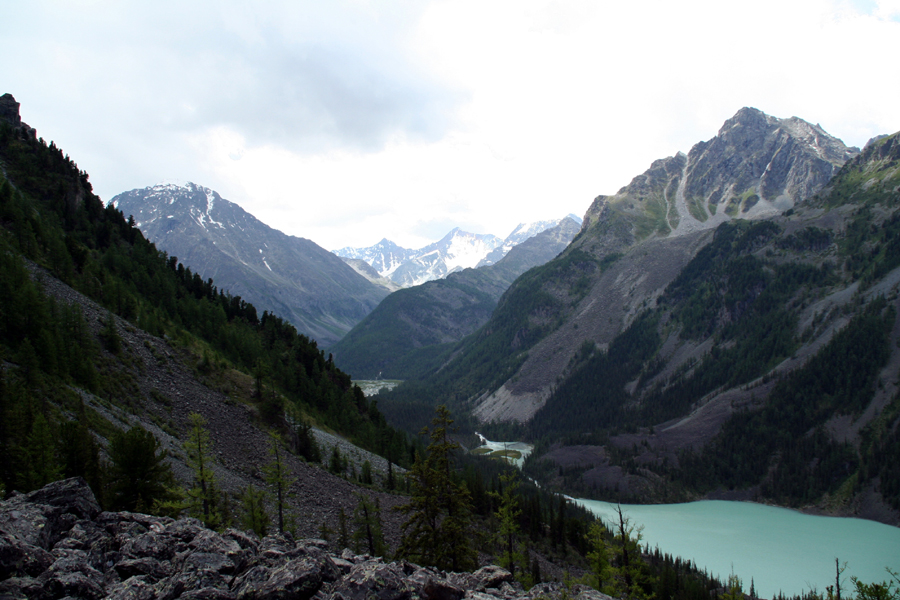 Altay mountains (Lake Kucerla), Photo by Vít Hněvkovský, 2006 Altaj (jezero Kučerla)